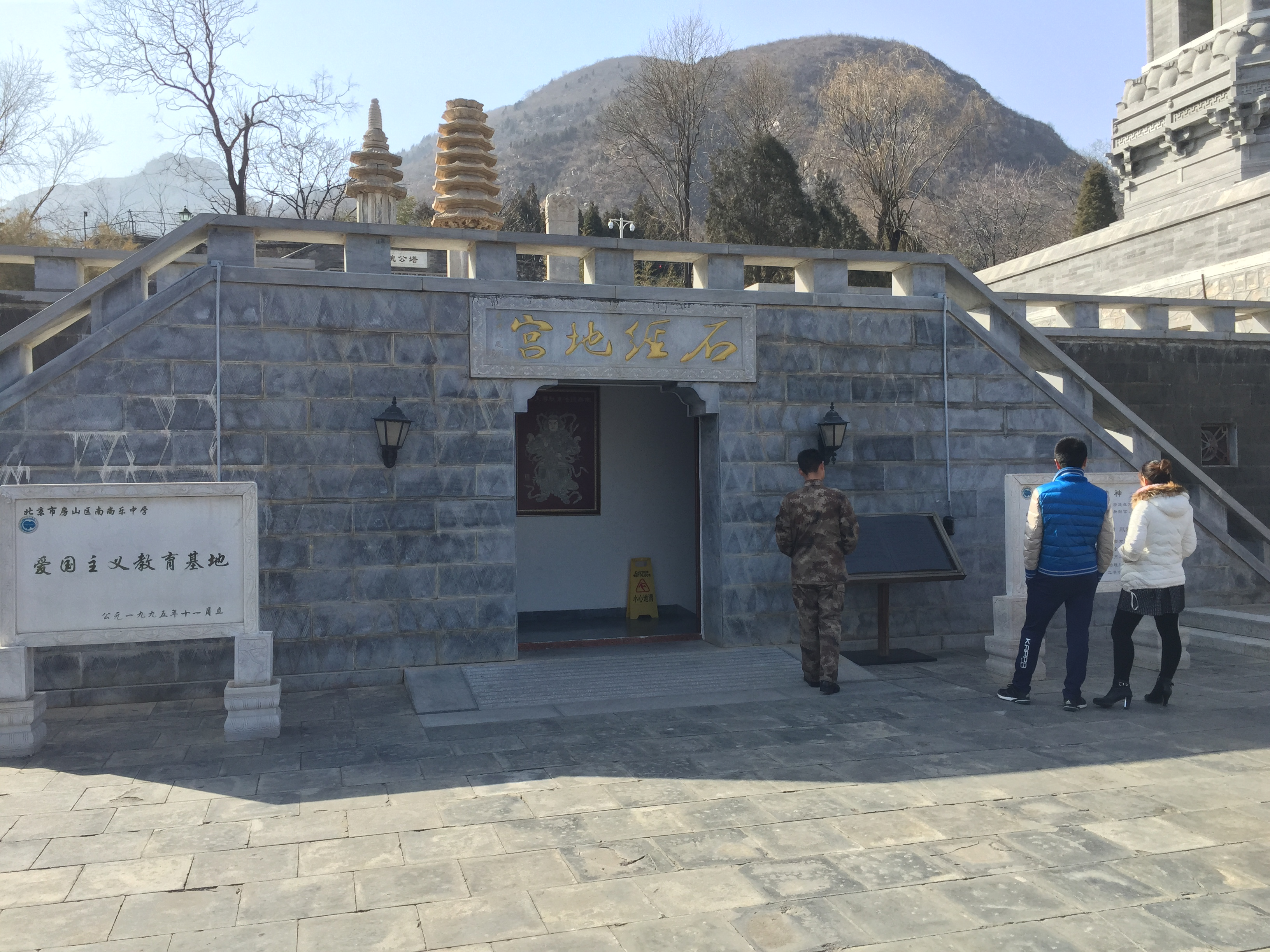 云居寺石经地宫